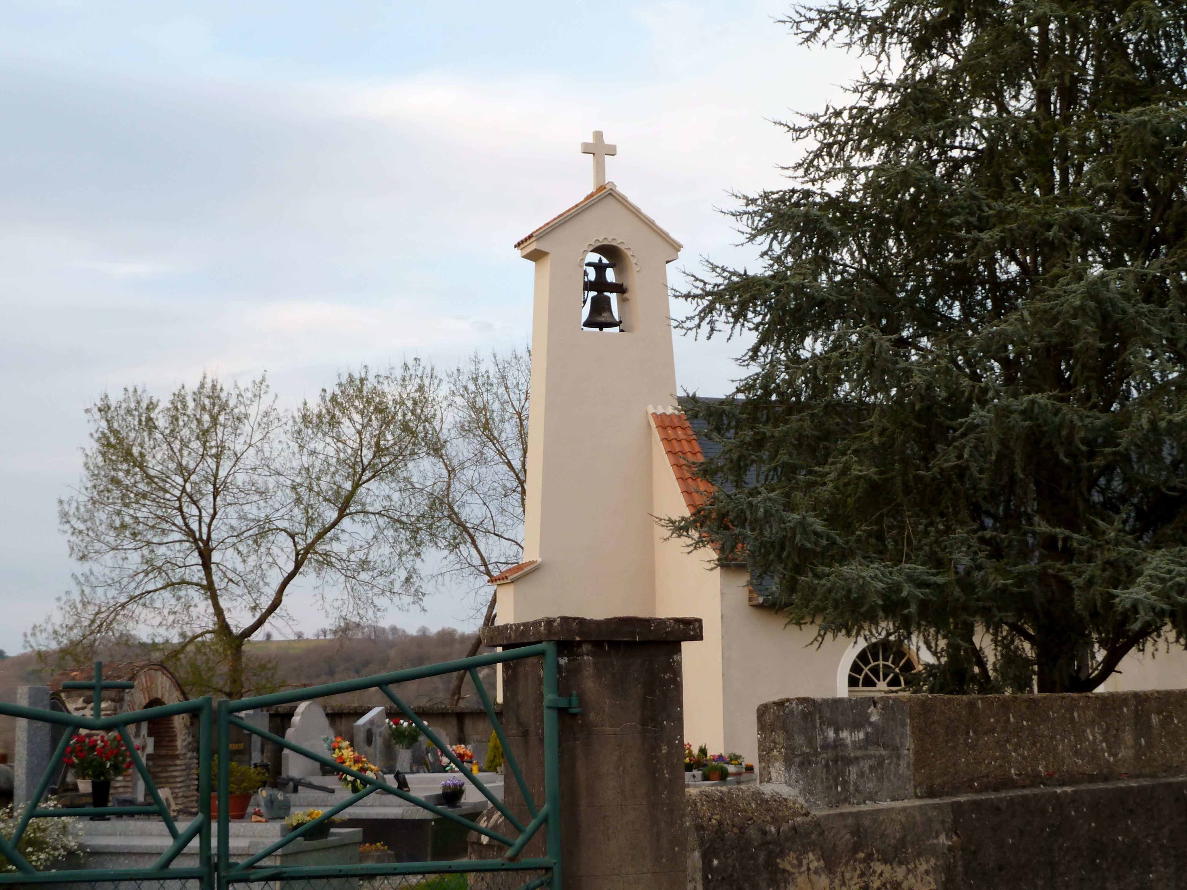 Église de Viven